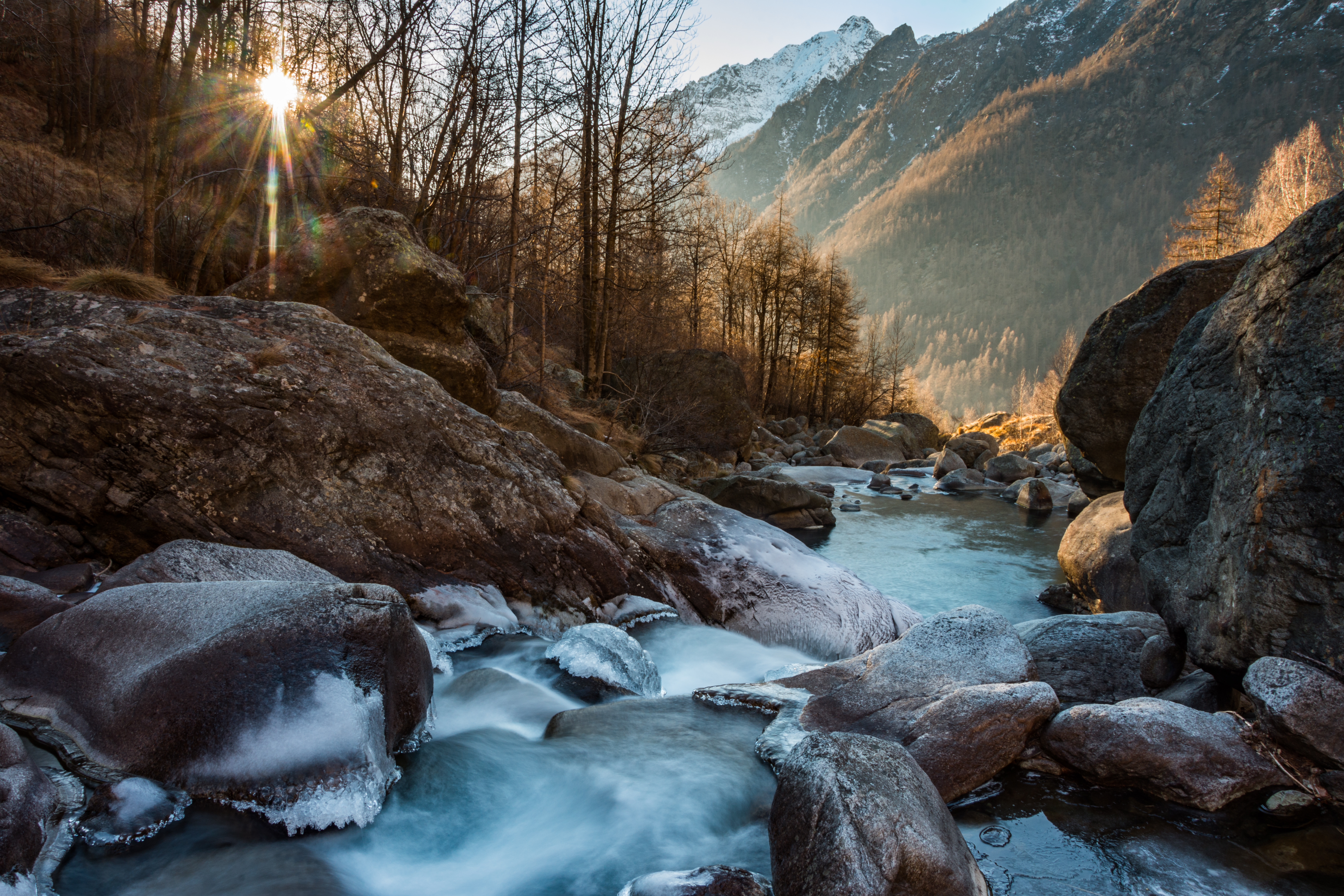 Parco nazionale del Gran Paradiso (Q847690)